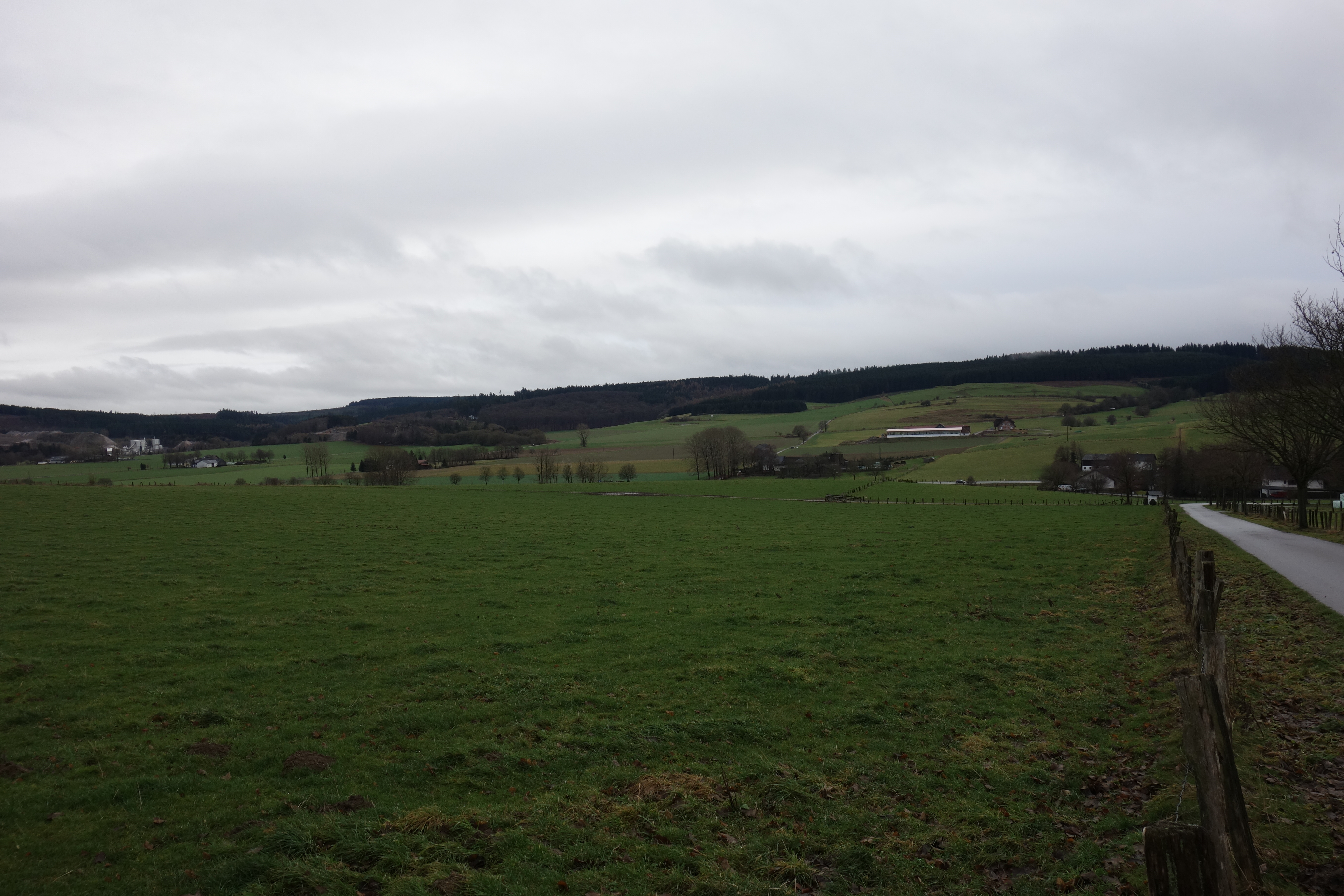 Im Bildmittelteil das Landschaftsschutzgebiet Südfeld. Grünland im Vordergrund gehört zum Landschaftsschutzgebiet Wintertal/Escherfeld und Wald im Hintergrund zum Landschaftsschutzgebiet Brilner Kalkplateau und Randhöhen.